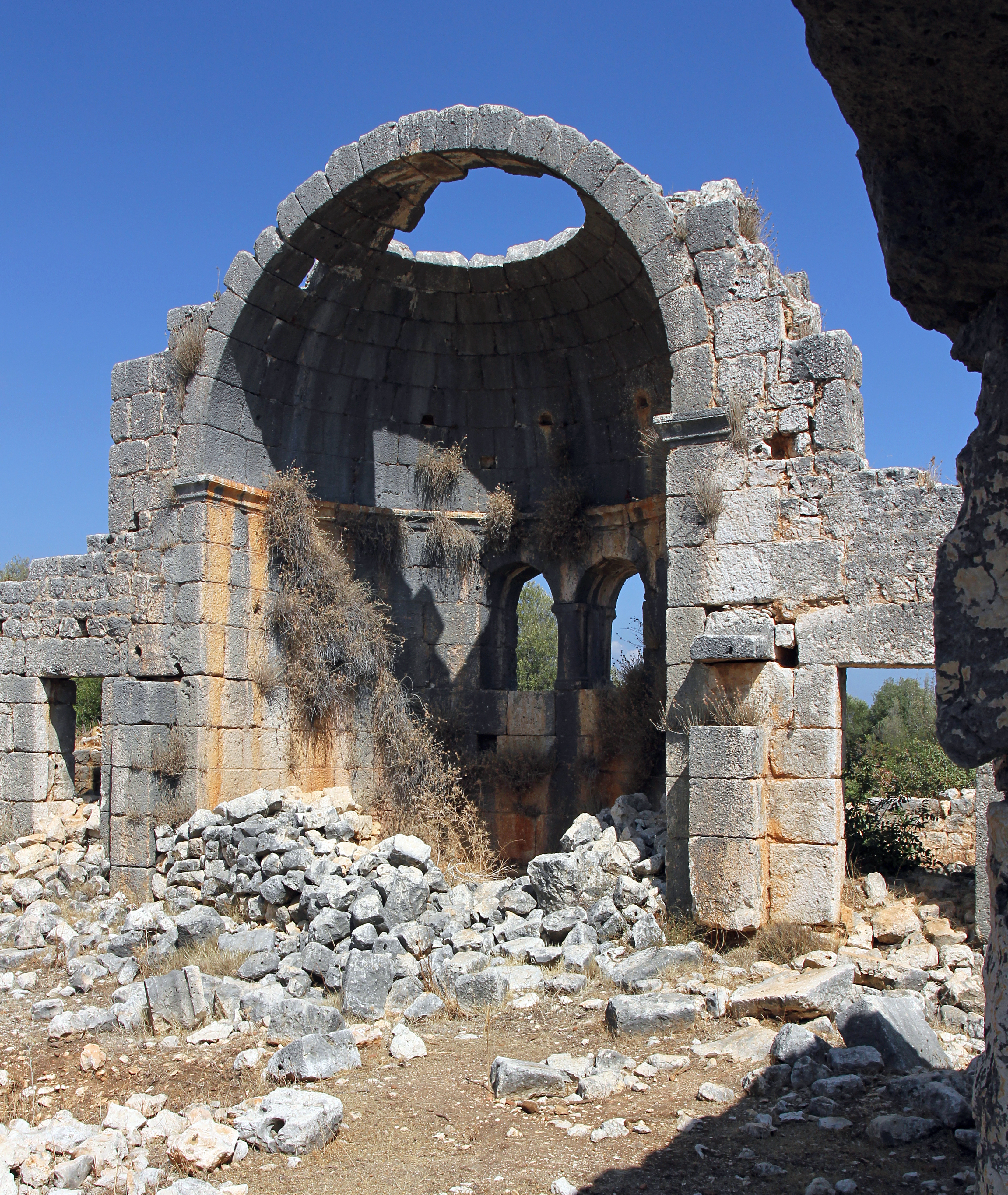 Yanıkhan, frühbyzantinische Dorfsiedlung mit zwei Säulenbasiliken in der Nähe von Erdemli, Südtürkei, Nordkirche, Apsis von Westen